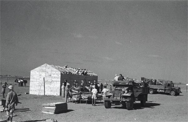 כפר דרום - ביום העליה לכפר דרום. הושלמה הקמתו של הצריף הראשון בשעות הבוקר. מכוניות נוספות מביאות חומרי בניין מבסיסי המוצא.